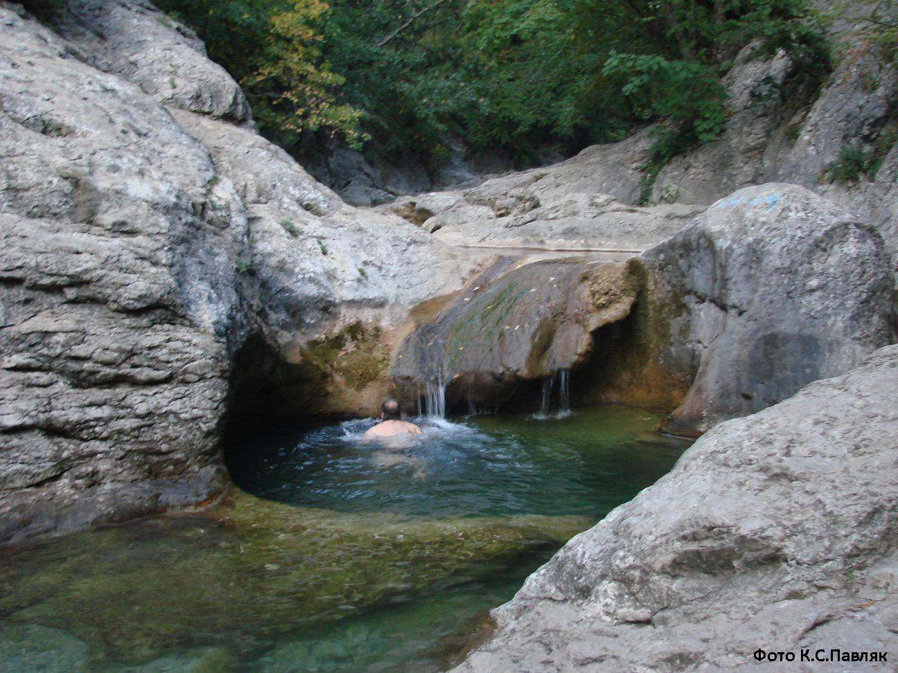 Ванна_Молодості: У Великому Каньйоні Криму